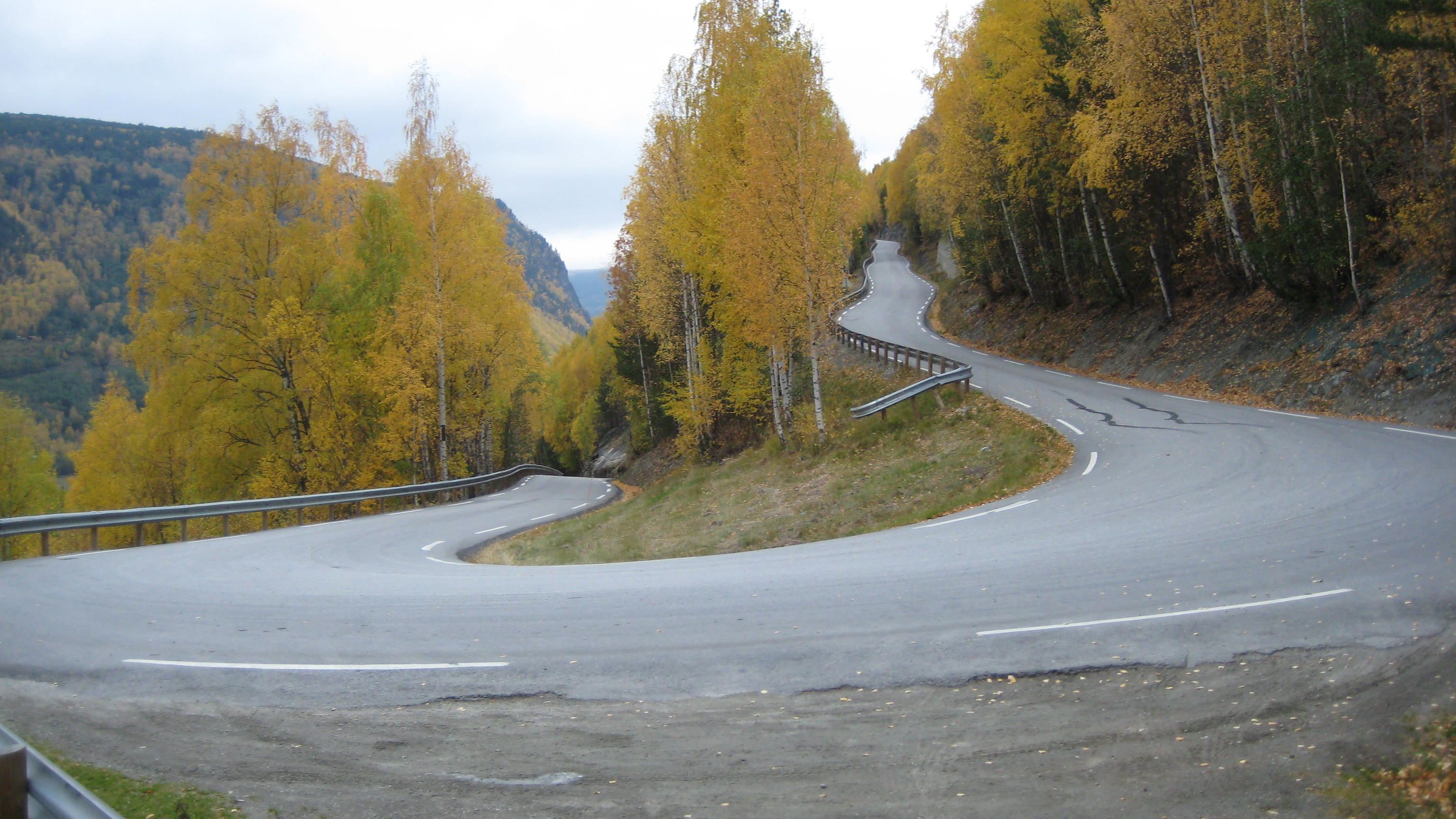 Fylkesvei 444, Oppland